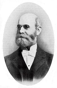 foto pri William J. Kirkpatrick, kiu mortis en 1921